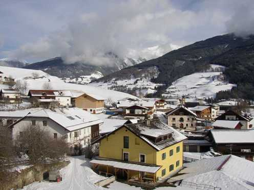 Mützens im Winter Jänner 2004